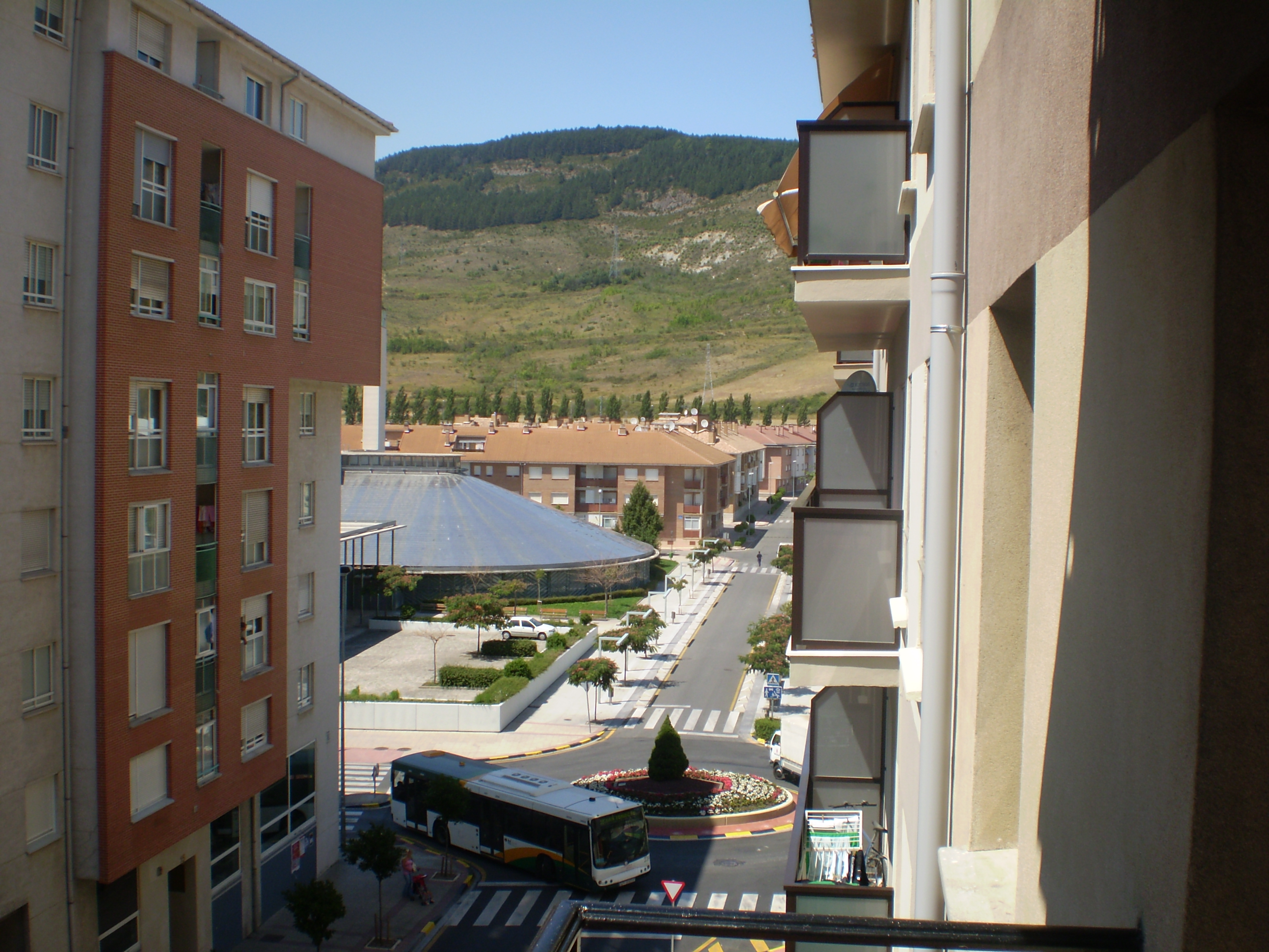 Calle Divina Pastora de Ansoáin (Navarra-España)